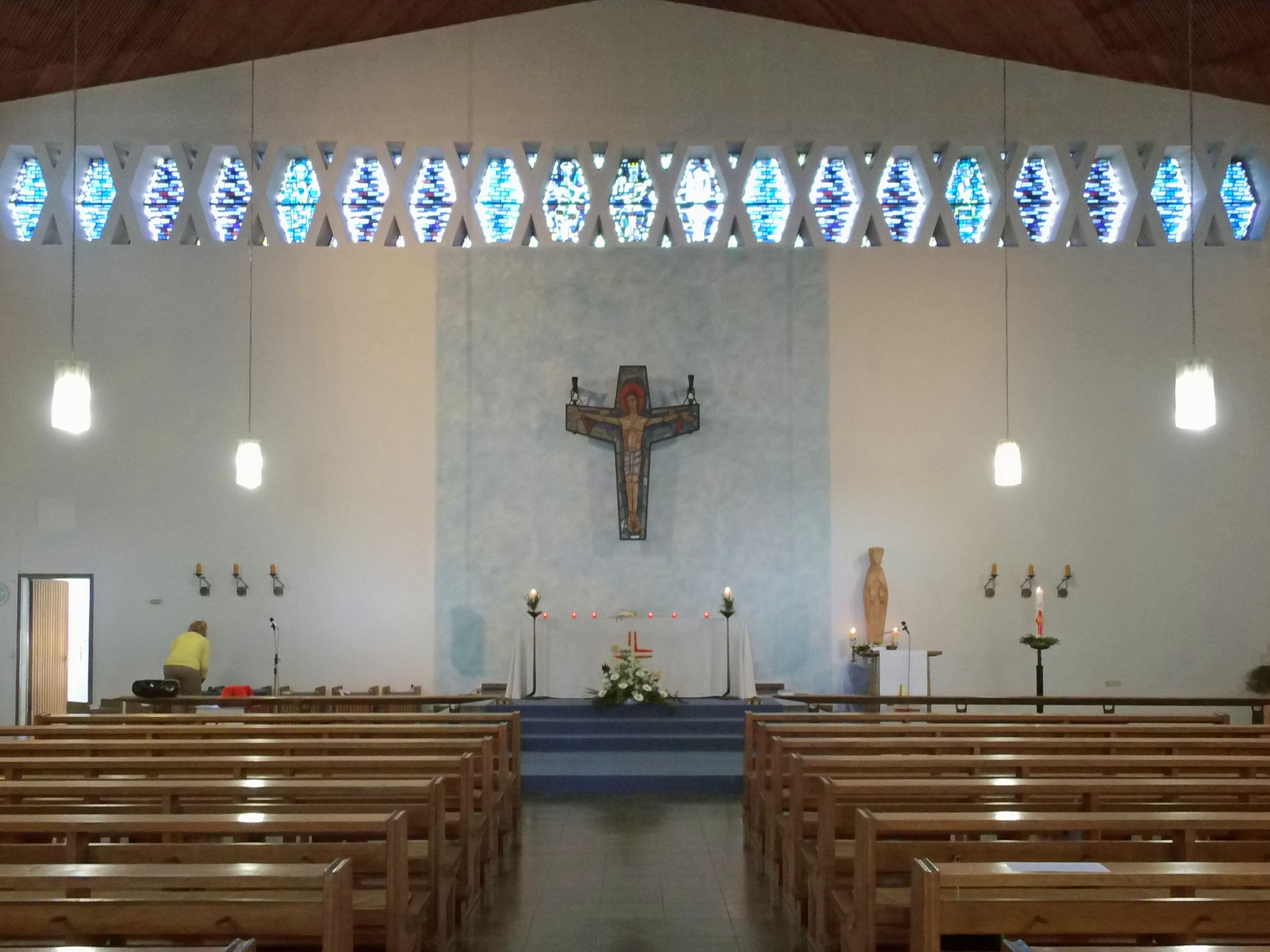 Katholische St-Marien-Kirche in Lengede.